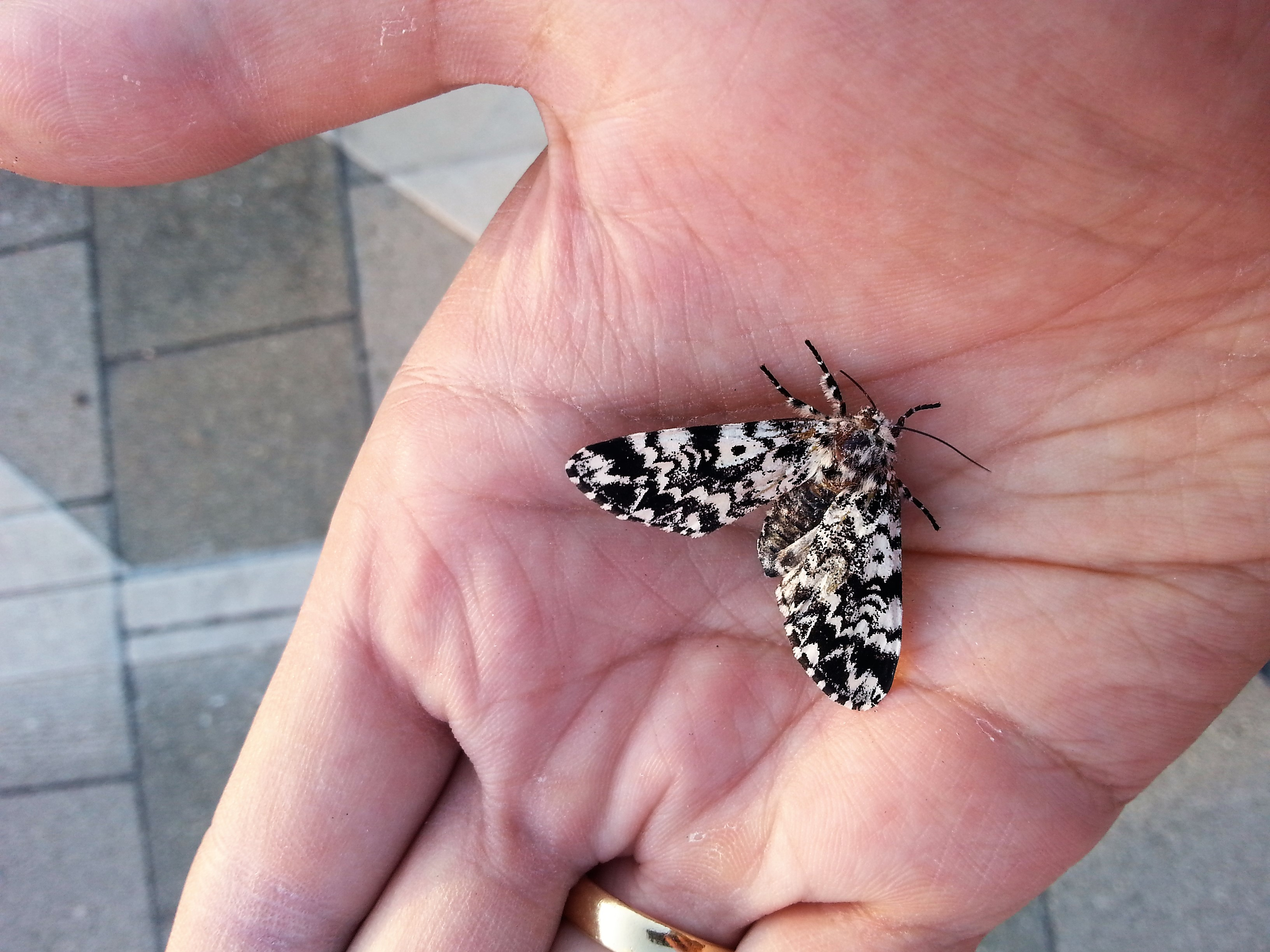 Toter Spanner